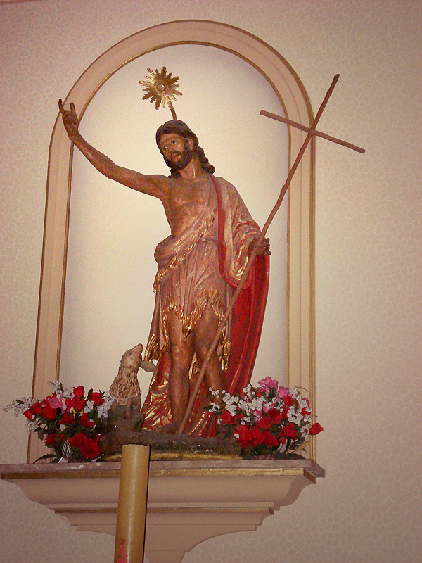 Interior da Igreja Nossa Senhora do Rosário, Porto Alegre, Brasil. Imagem de São João Batista no batistério